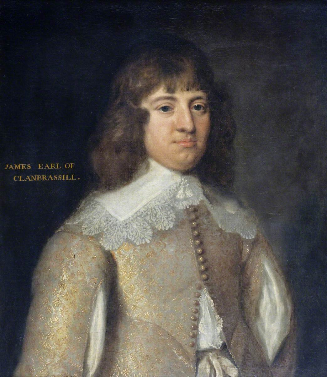 James Hamilton